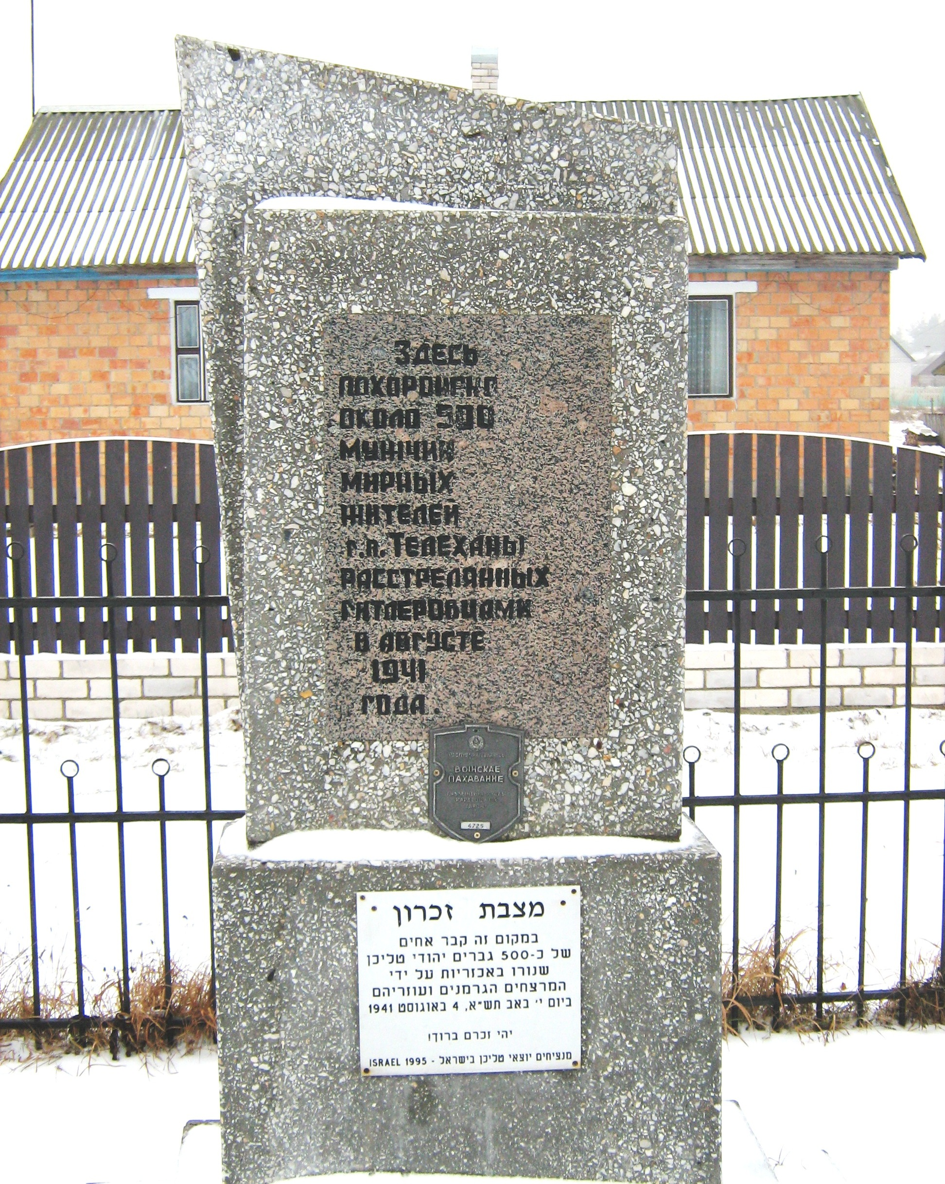 Памятник на месте убийства нацистами 500 евреев в Телеханах на улице Я.Купалы. Установлен в 1995 году. Учётный номер паспорта воинского захоронения: 4725